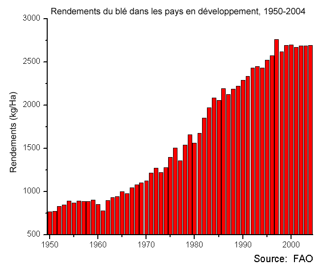 Rendements du blé dans les pays en développement, 1950-2004. Image éditée à partir de la version anglaise (domaine public).